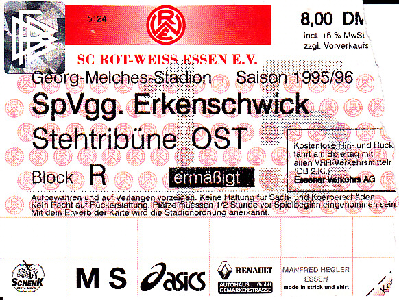 Eintrittskarte